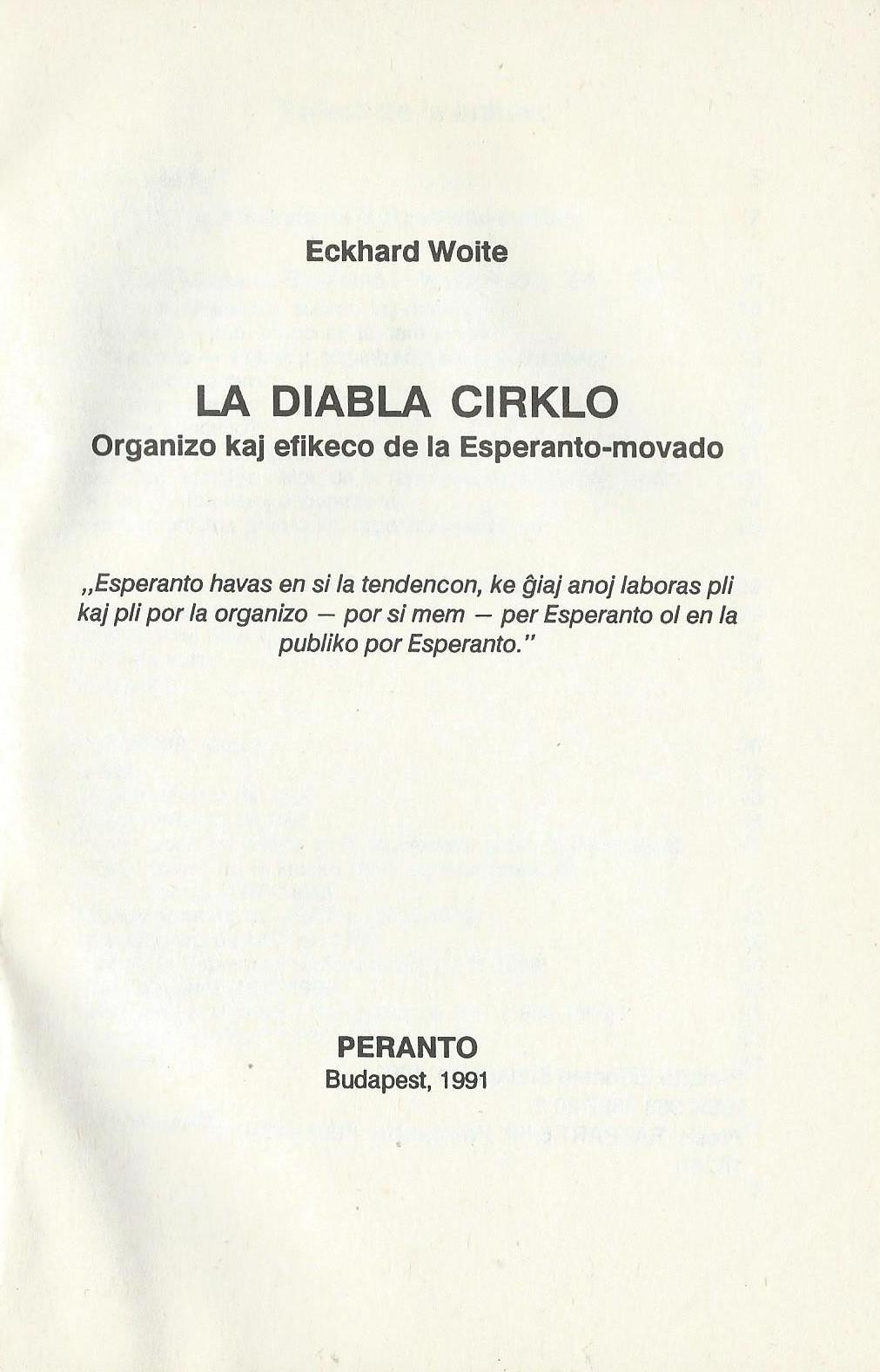 kovrilo de "La Diabla Cirklo", 1991